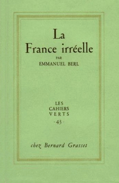 La France irréelle d'Emmanuel Berl, Grasset, Les Cahiers verts, nouvelle série 1957.